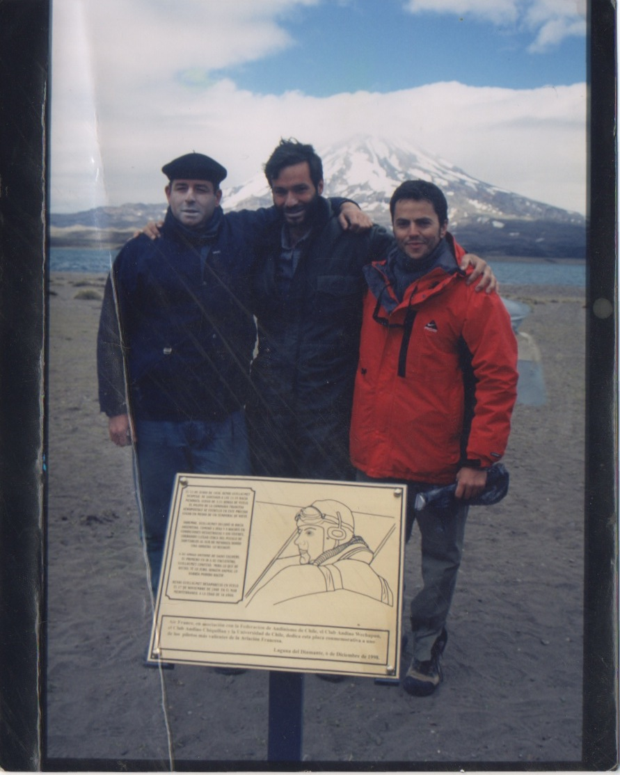 1998, pose d'une palque commémorative par Marc Turrel, Christian Fédabeille en hommage à l'attérissage forcé de Henri Guillaumet.